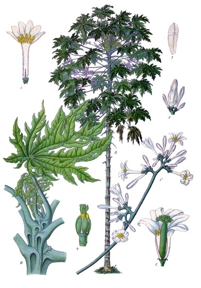 Melonenbaum. A männlicher Baum, verkleinert. B Gipfelknospe desselben, natürliche Grösse. C Teil der männlichen Blütenrispe, natürliche Grösse. 1 männliche Blüte, aufgeschnitten, natürliche Grösse; 2 ein Blumenkronzipfel mit Längsfalz, Rückenansicht, 11/2 vergrössert; 3 endständiges Dichasium mit der Knospe einer Zwitterblüte der Forma ♂ Forbesii Solms, natürliche Grösse;4 Geschlechtsorgane dieser Zwitterblüte 11/2; 5 Zwitterblüte der Form ♂ Correae Solms, natürliche Grösse.